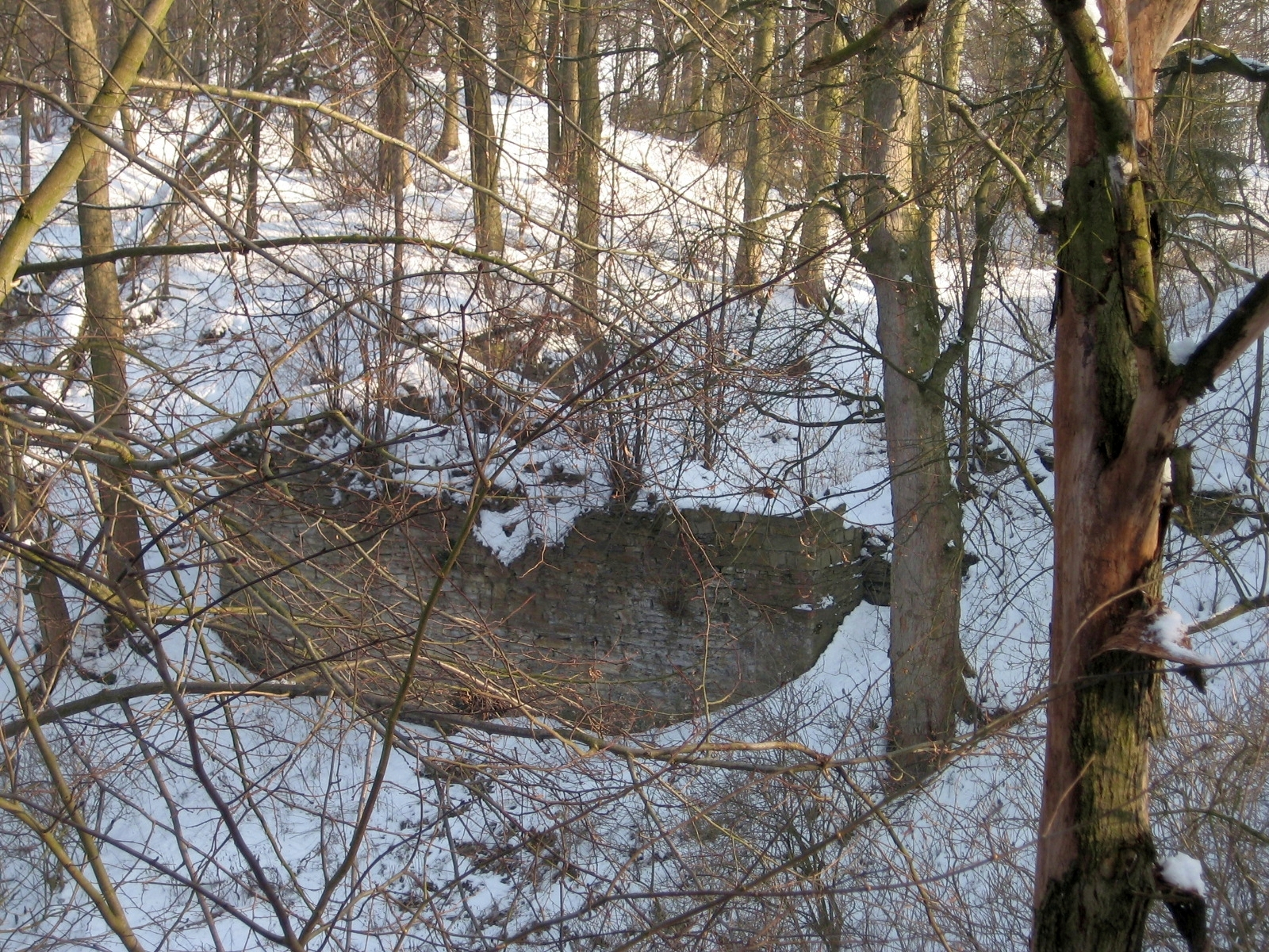 Hrad Rýzmburk, zřícenina (Rýzmburk), Rýzmburk